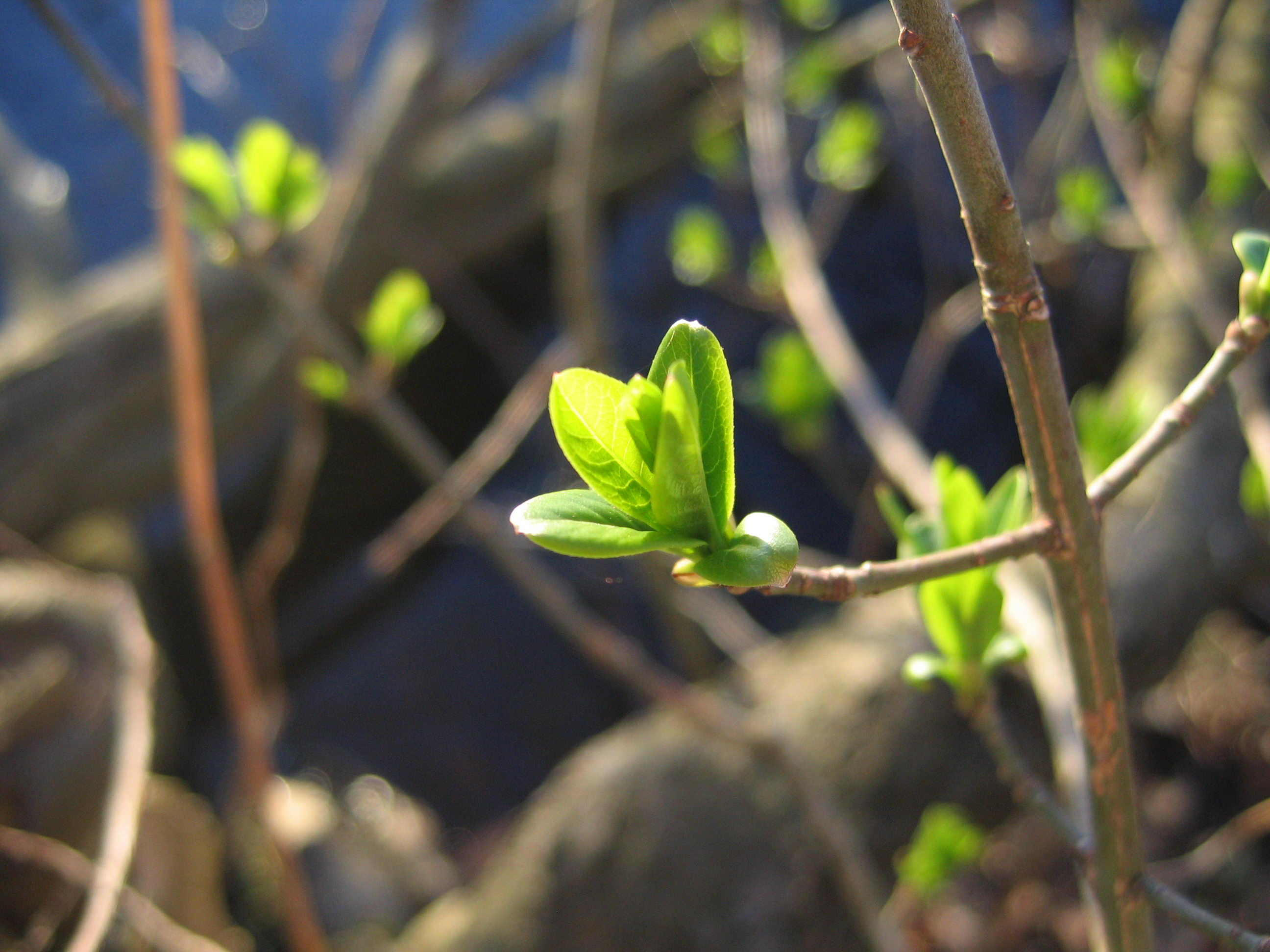 Euonymus europaeus